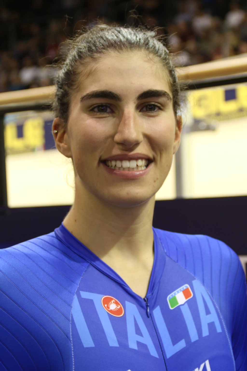 Elisa Balsamo, italienische Radsportlerin